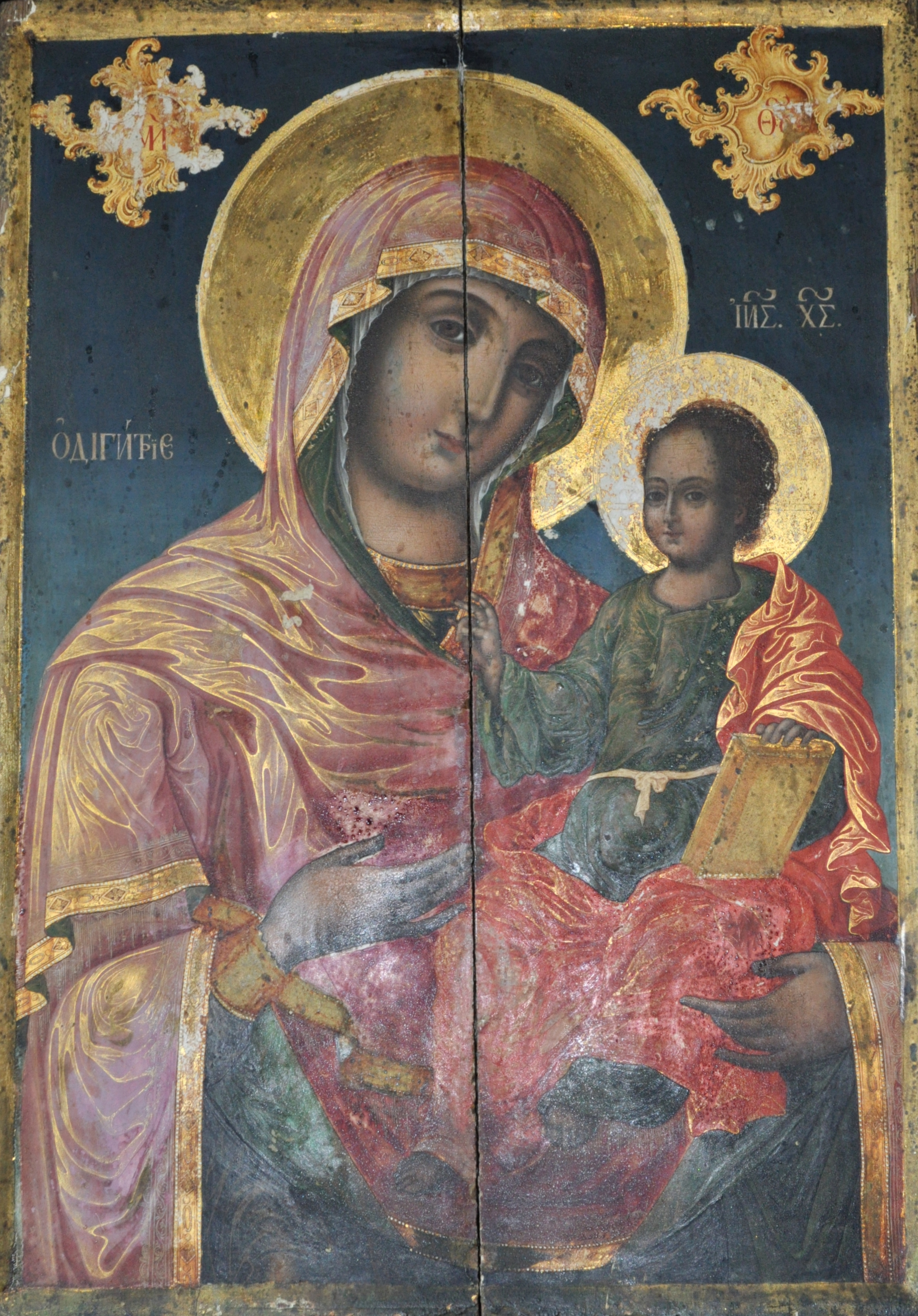 Mănăstirea Dălhăuți, Vrancea